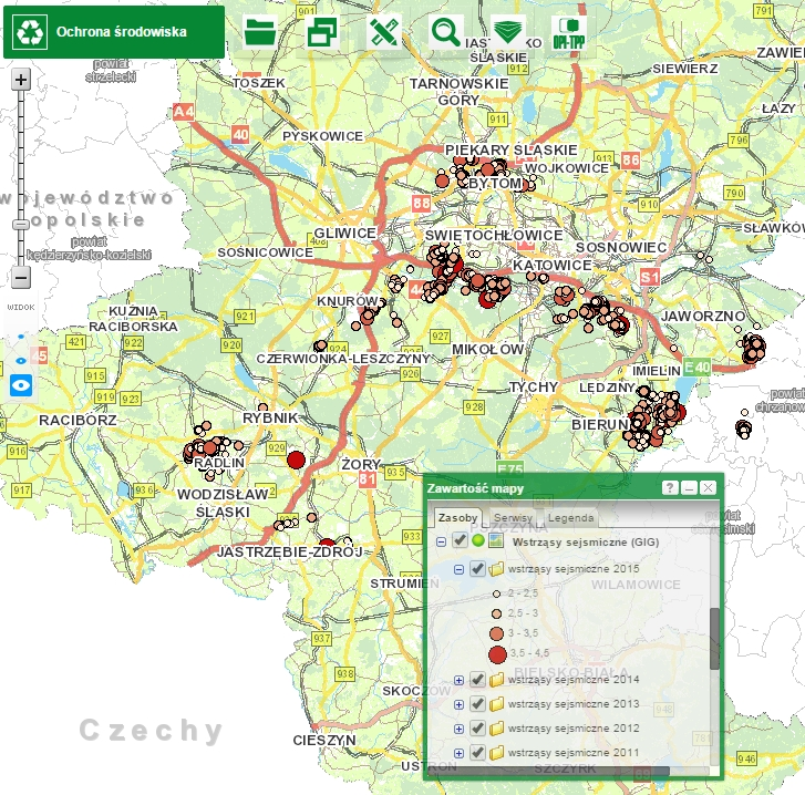 Mapa wstrząsów sejsmicznych na bazie danych z GIG